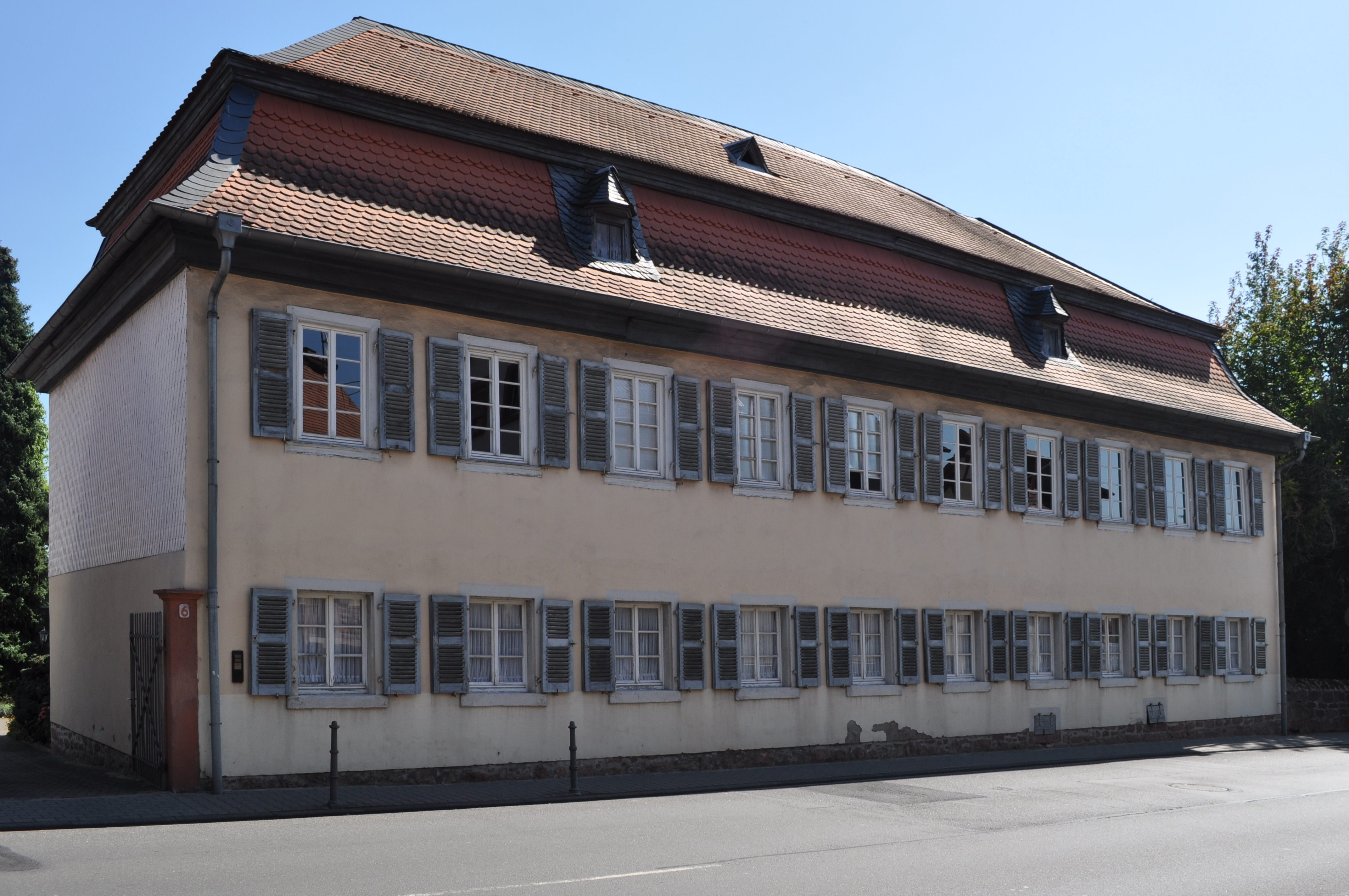 Breuberg-Sandbach, Ehemaliges Pfarr- und Jagdhaus, Höchster Straße 6